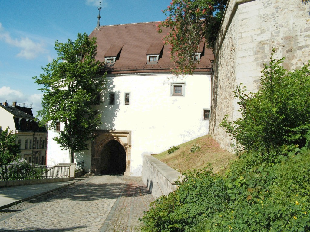 Schloss Altenburg